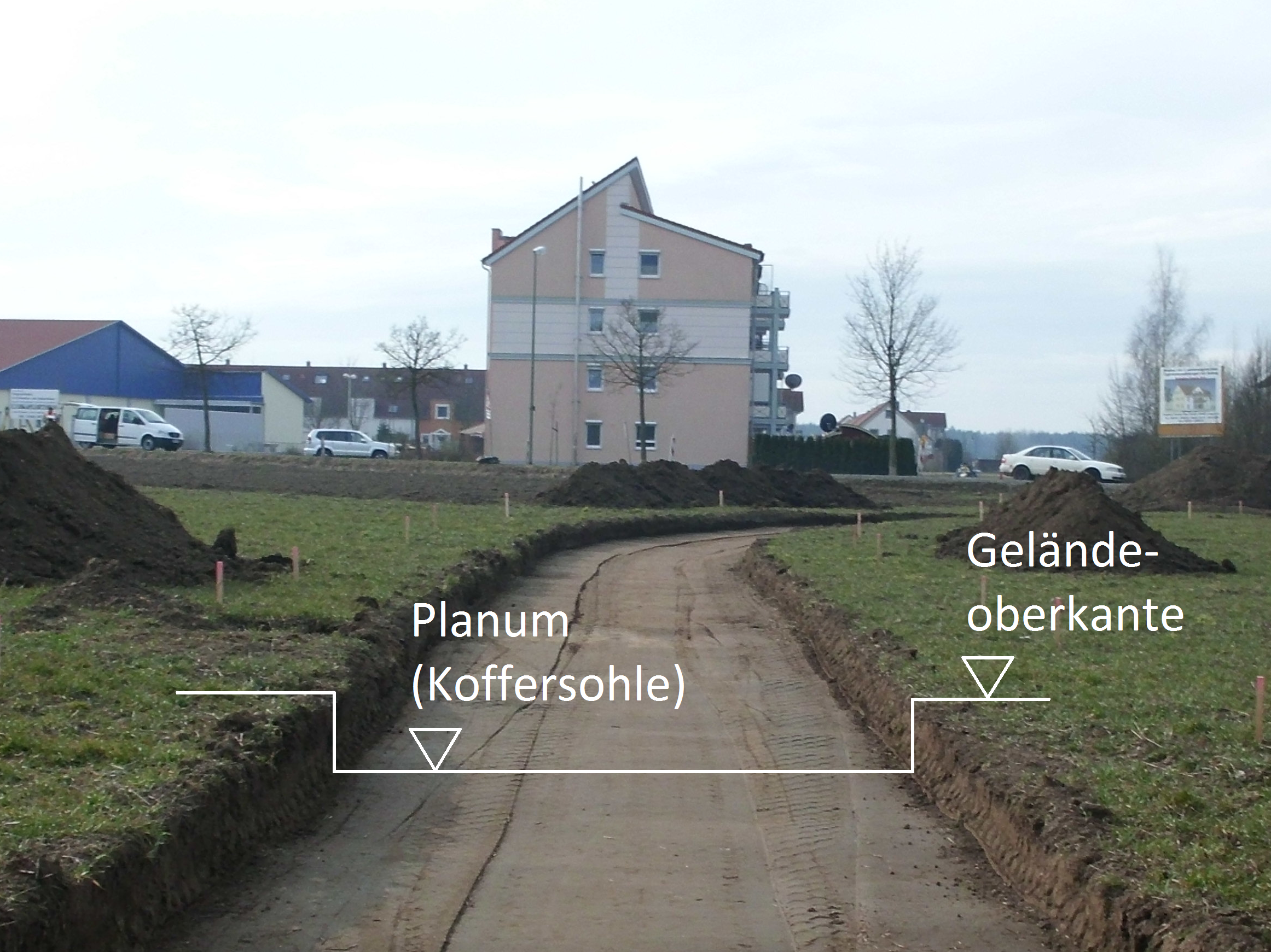 Darstellung einer Auskofferung für einen Geh- und Radweg mit Höhenkoten.